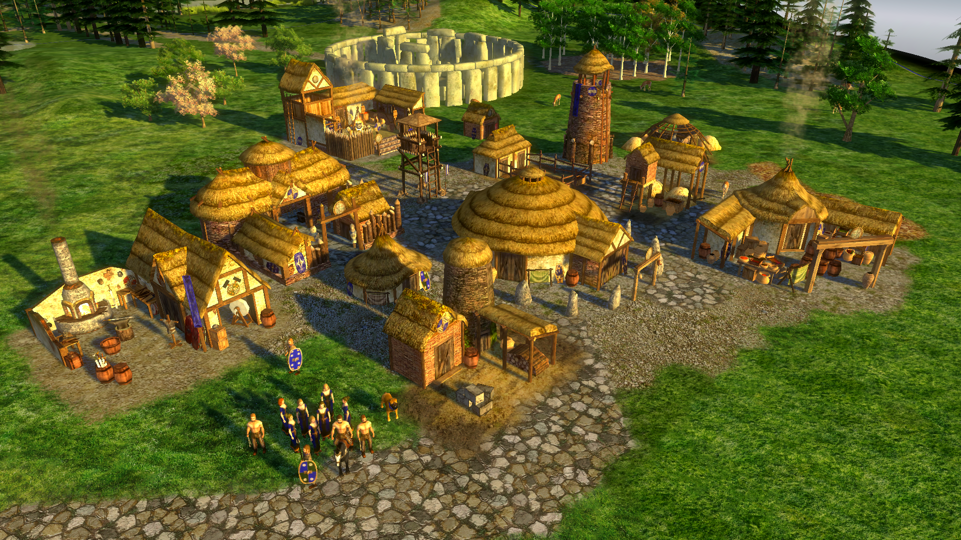 0 A.D. Brittonen